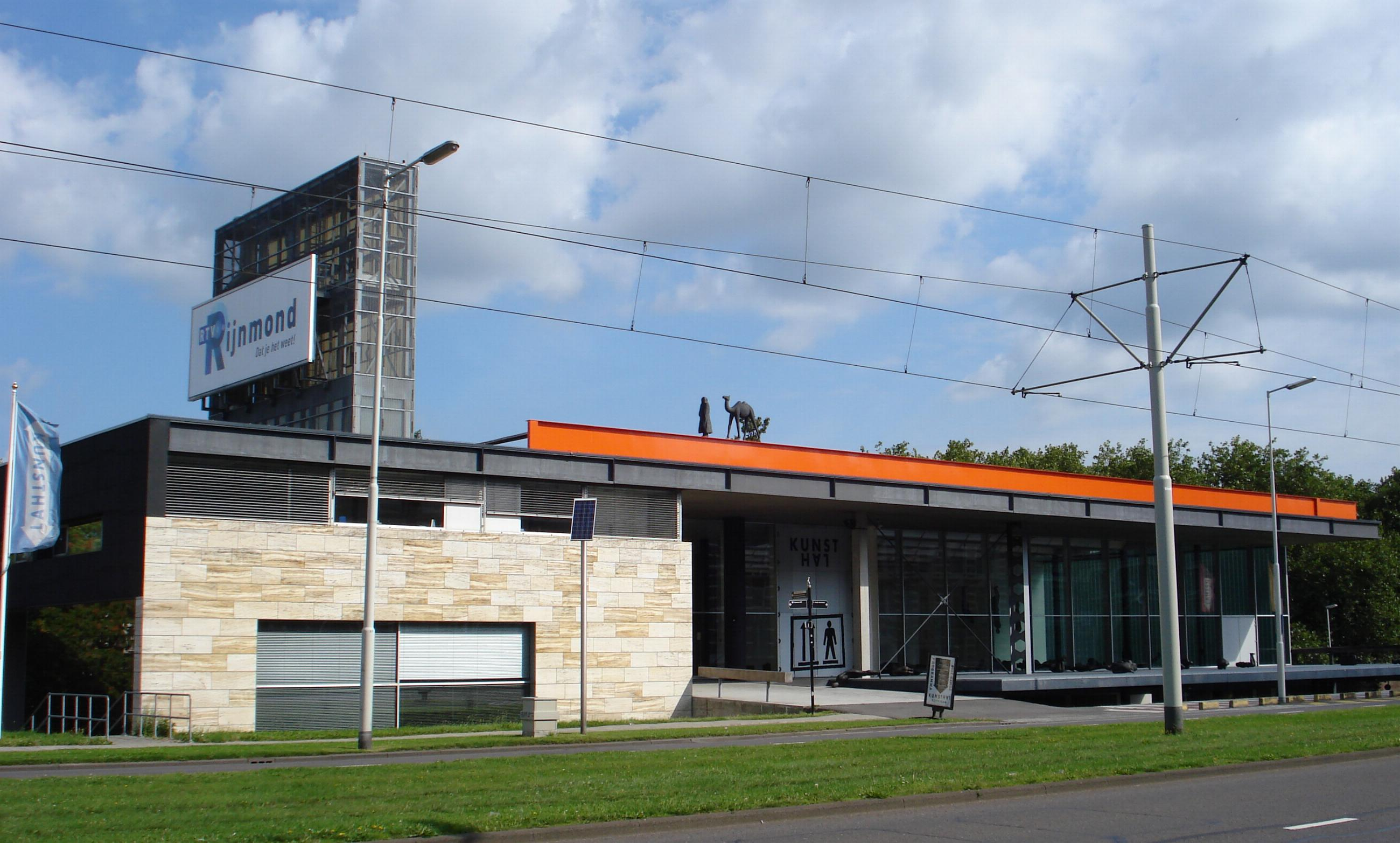 Rotterdam, Westzeedijk. De Kunsthal. Rotterdam/The Netherlands.